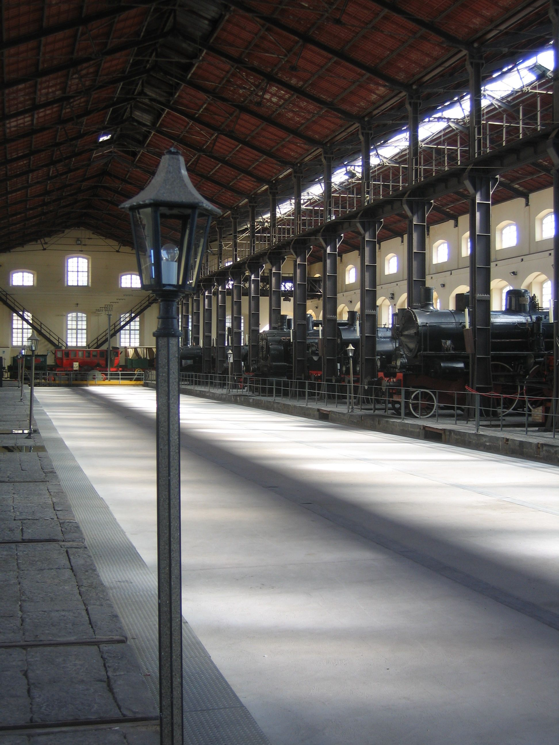 Haupthalle Eisenbahnmuseum Pietrarsa; 2. Hälfte 19. Jh.